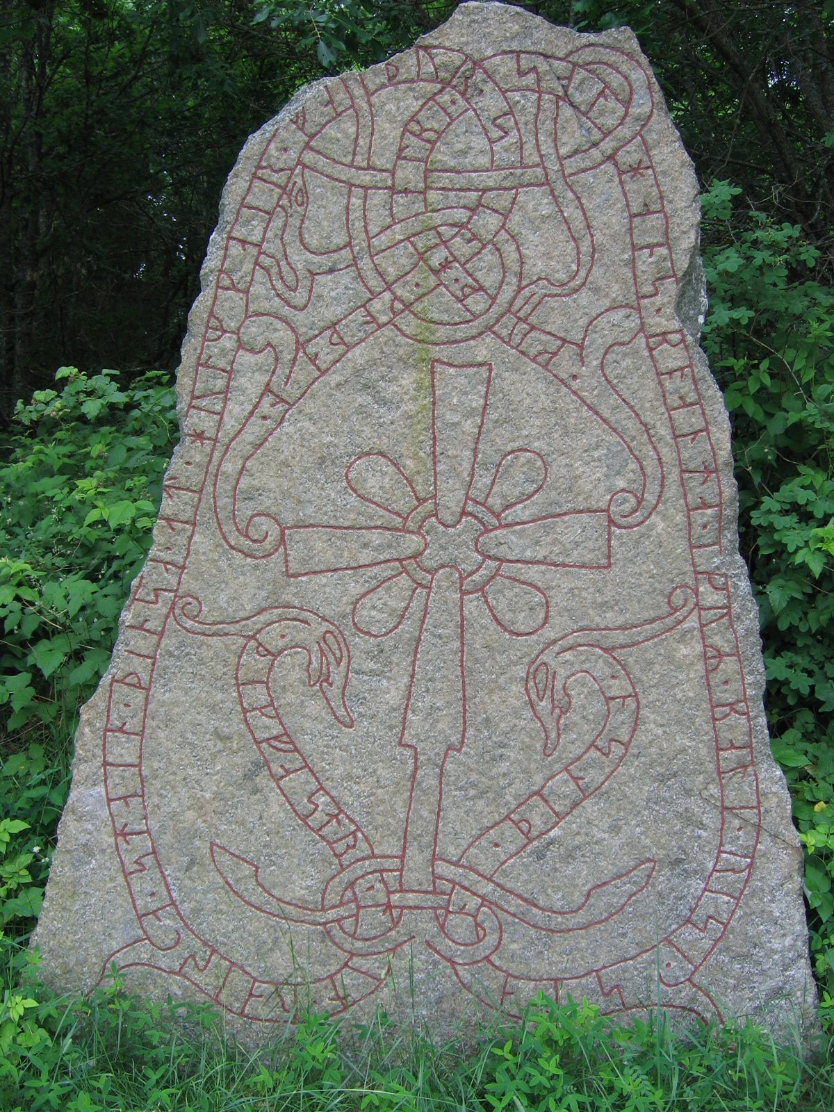 Runestone